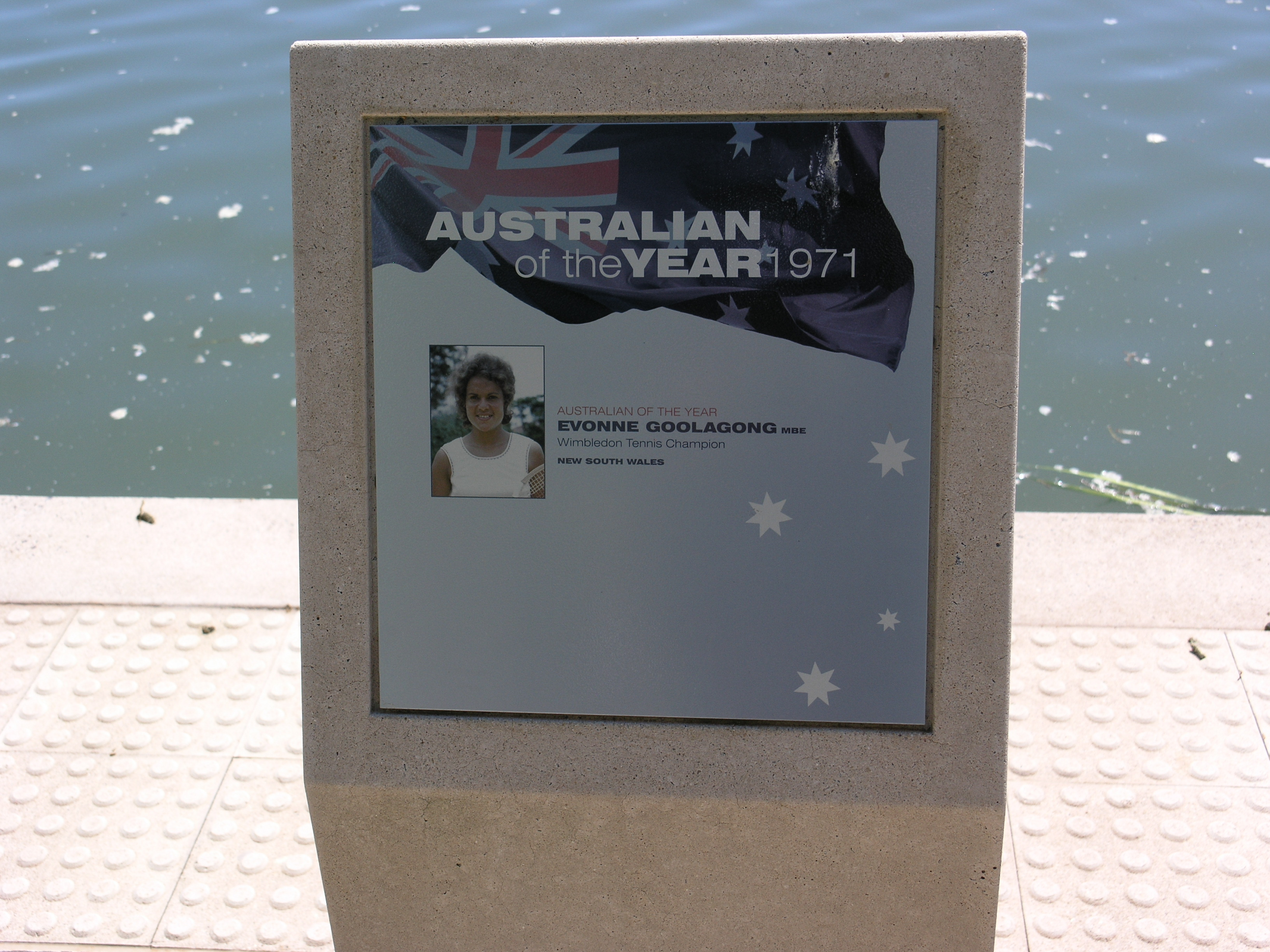 Canberra